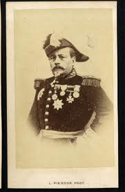 Portrait du général UHRICH, par PIERSON